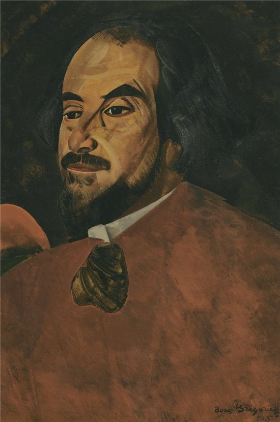 Борис Дмитриевич Григорьев (1886-1939) «Портрет актера, предположительно, Николая Александрова»